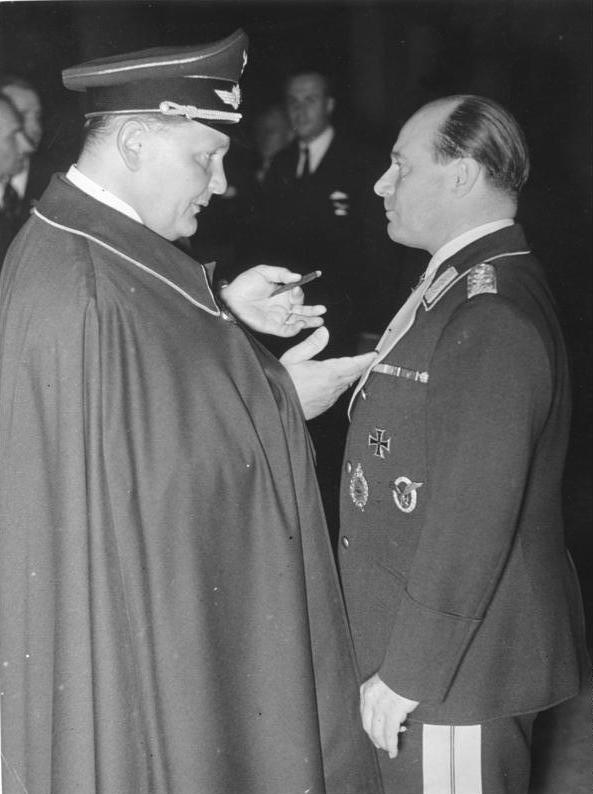 Scherl: Generalfeldmarschall Göring im Gespräch mit Generalmajor Udet. 25.6.1938